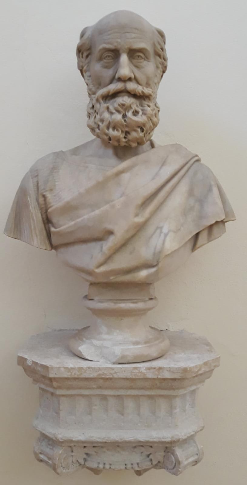 Busto di Emilio Macro